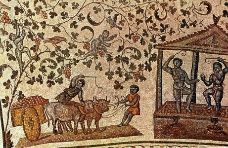 Description : Scène de vendanges, Rome, IVe siècle av. J.-C.